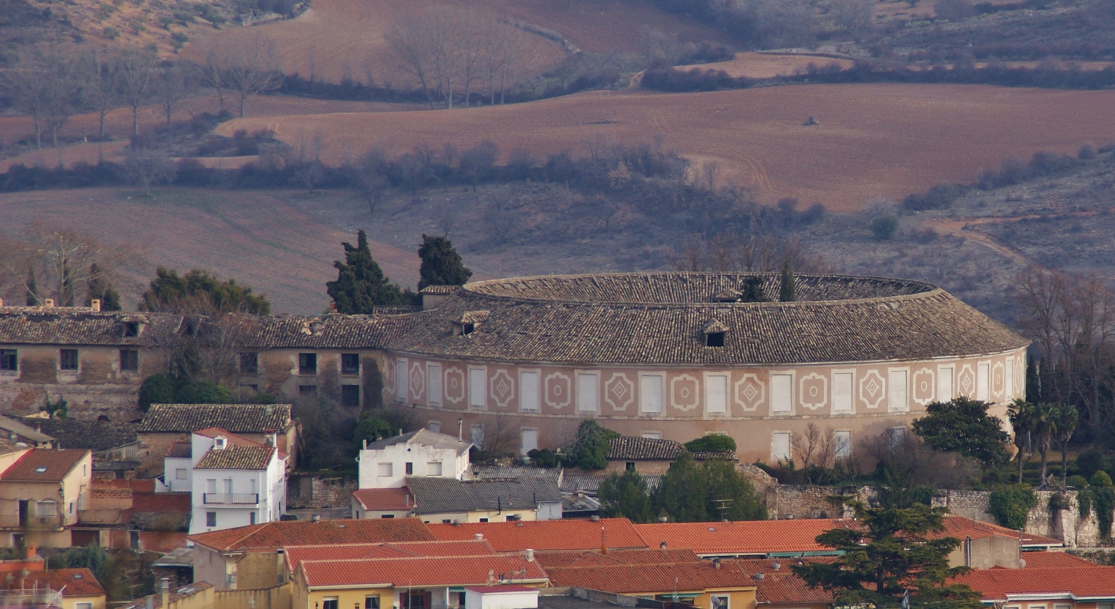 Real Fábrica de Paños de Carlos III de Brihuega, Guadalajara, siglo XVIII